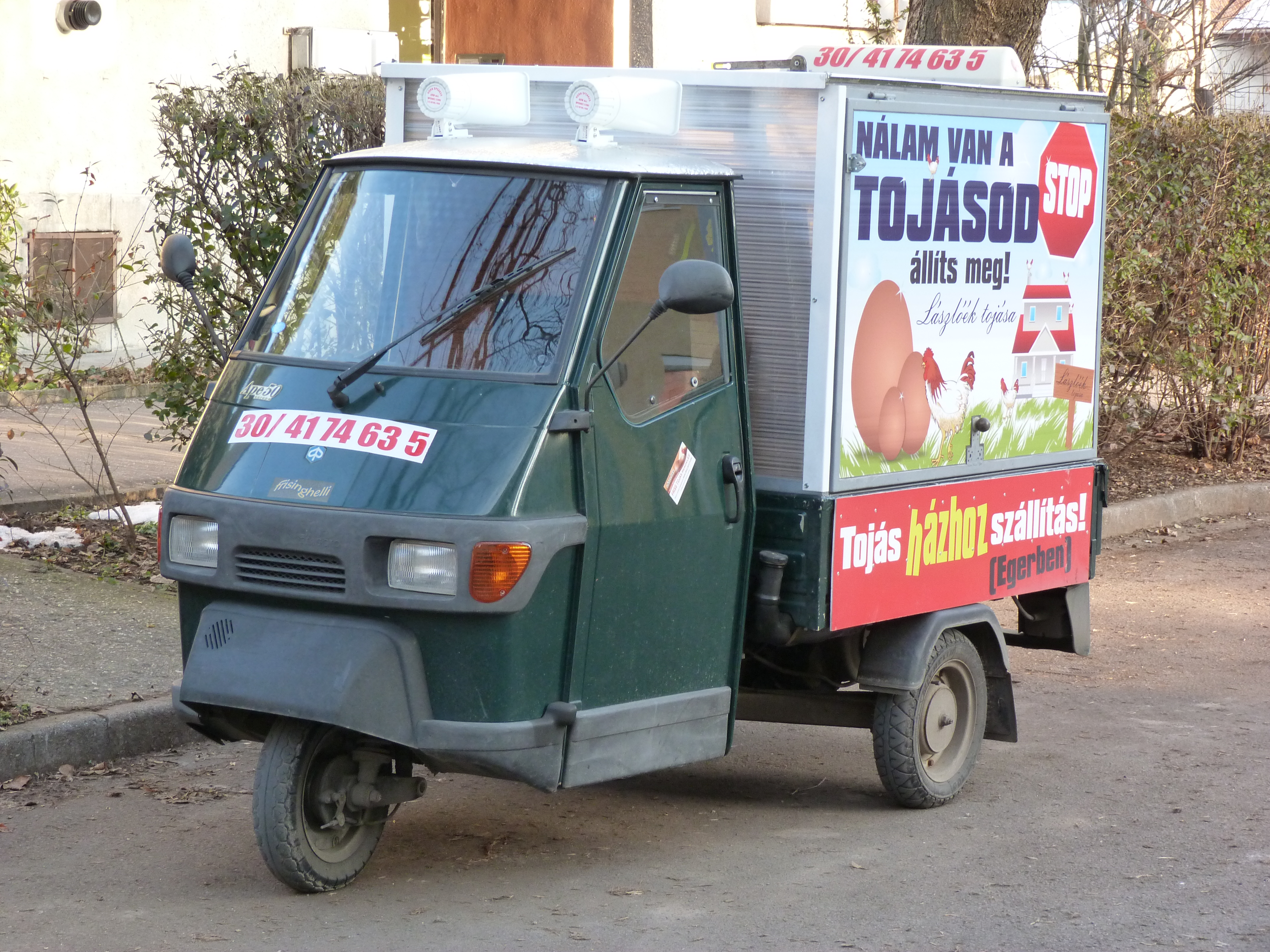 A felvétel 2014. február 5 -én szerdán készült Egerben. Tricikli. ©© Derzsi Elekes Andor, Budapest, 2014, A kép és filmfelvételek egészben, vagy részletekben másolását, bármilyen úton történő sokszorosítását és felhasználását a szerző ellenérték nélkül, jogutódjaira is kihatóan megengedi. Az engedély kiterjed a kereskedelmi célú hasznosításra is. Kéri azonban nevének feltüntetését a felhasználás során. A Metapolisz sorozat valamennyi képe és filmje Creative Commons alatti valamint kereskedelmi - for profit - célra is felhasználható. Ajánlott hivatkozás: Derzsi Elekes Andor: Metapolisz DVD line